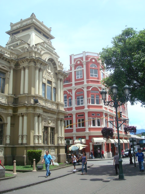 Vista del Edificio de Correos y Telégrafos (izquierda) y el Edificio Herdocia (derecha) en San José de Costa Rica.